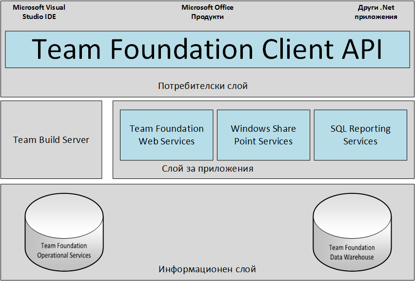 архитектура на TFS